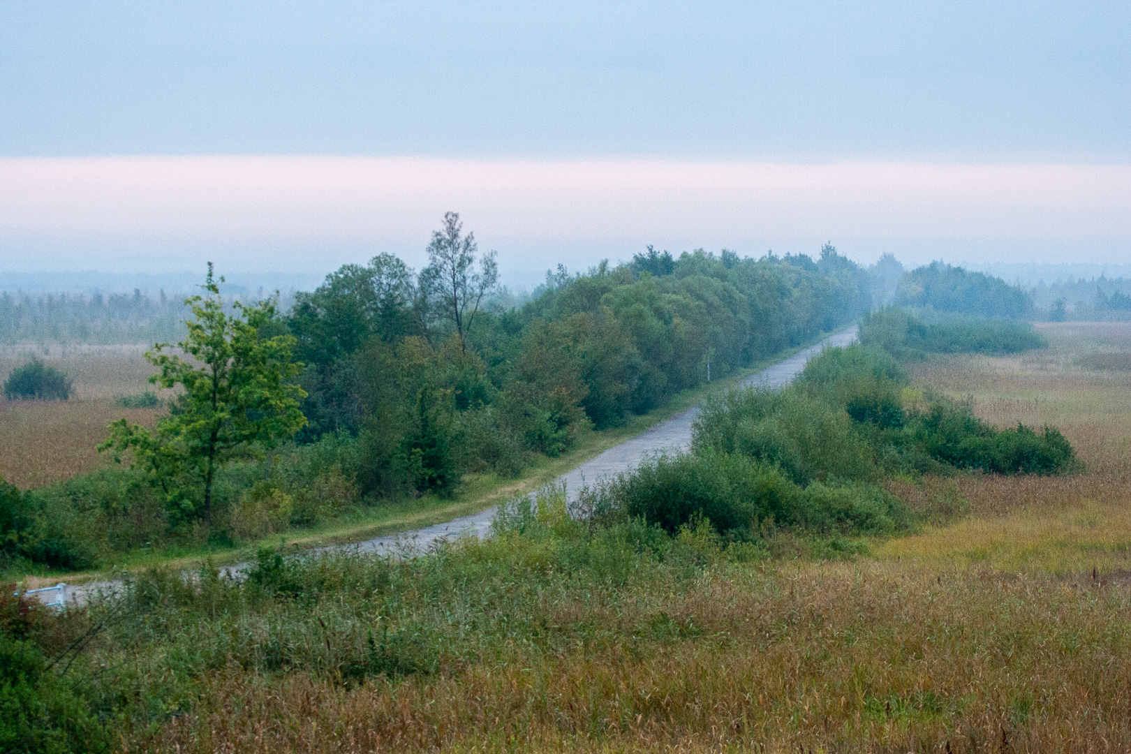 Carska Droga (Carski Trakt, Carska Szosa) przecinająca Bagno Ławki, widok z wieży widokowej, 21 września 2005 wcześnie rano. This is a photography of Natura 2000 protected area with ID PLB200006 This is a photography of Natura 2000 protected area with ID PLH200008